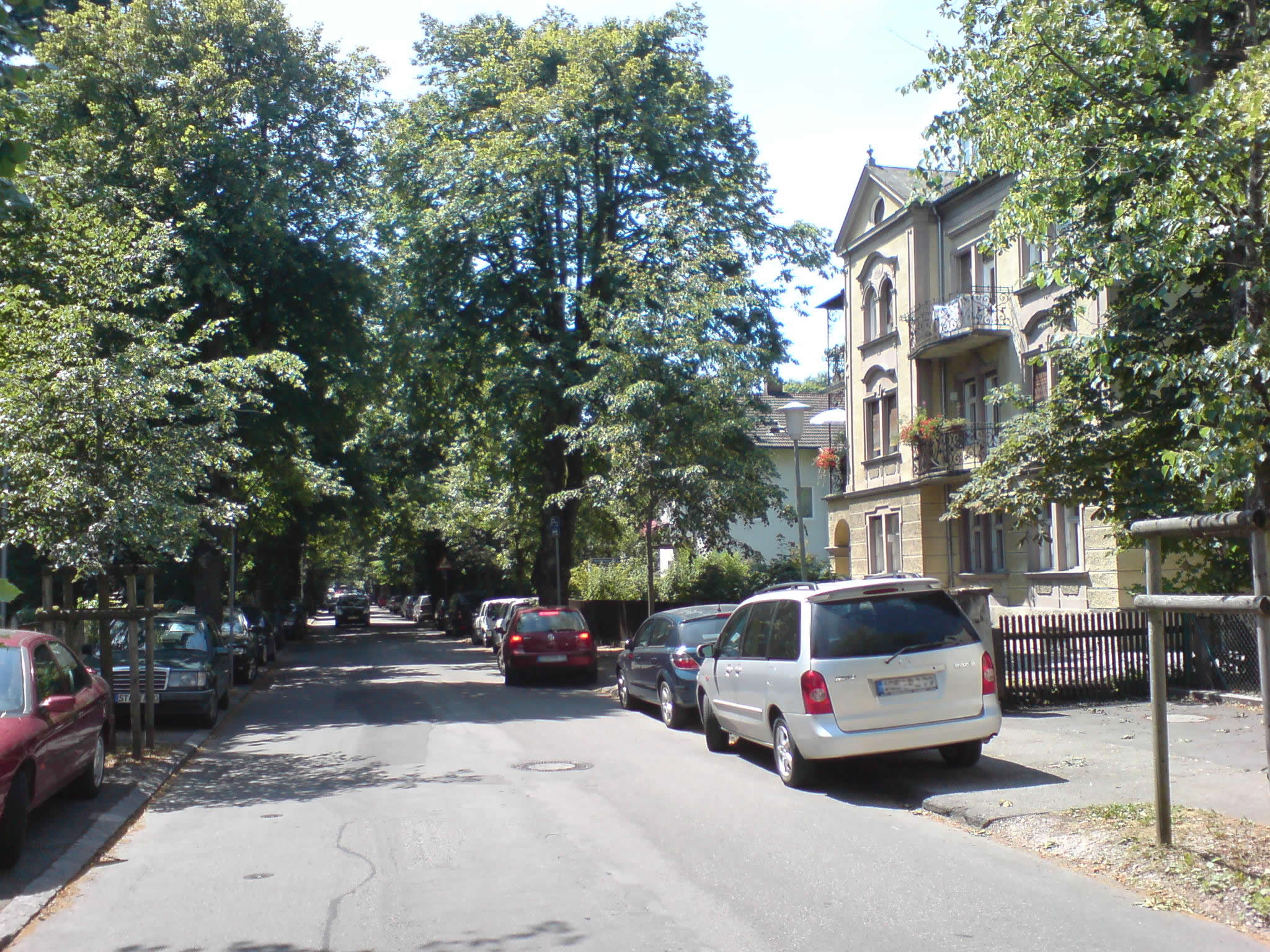 Villengegend in Starnberg